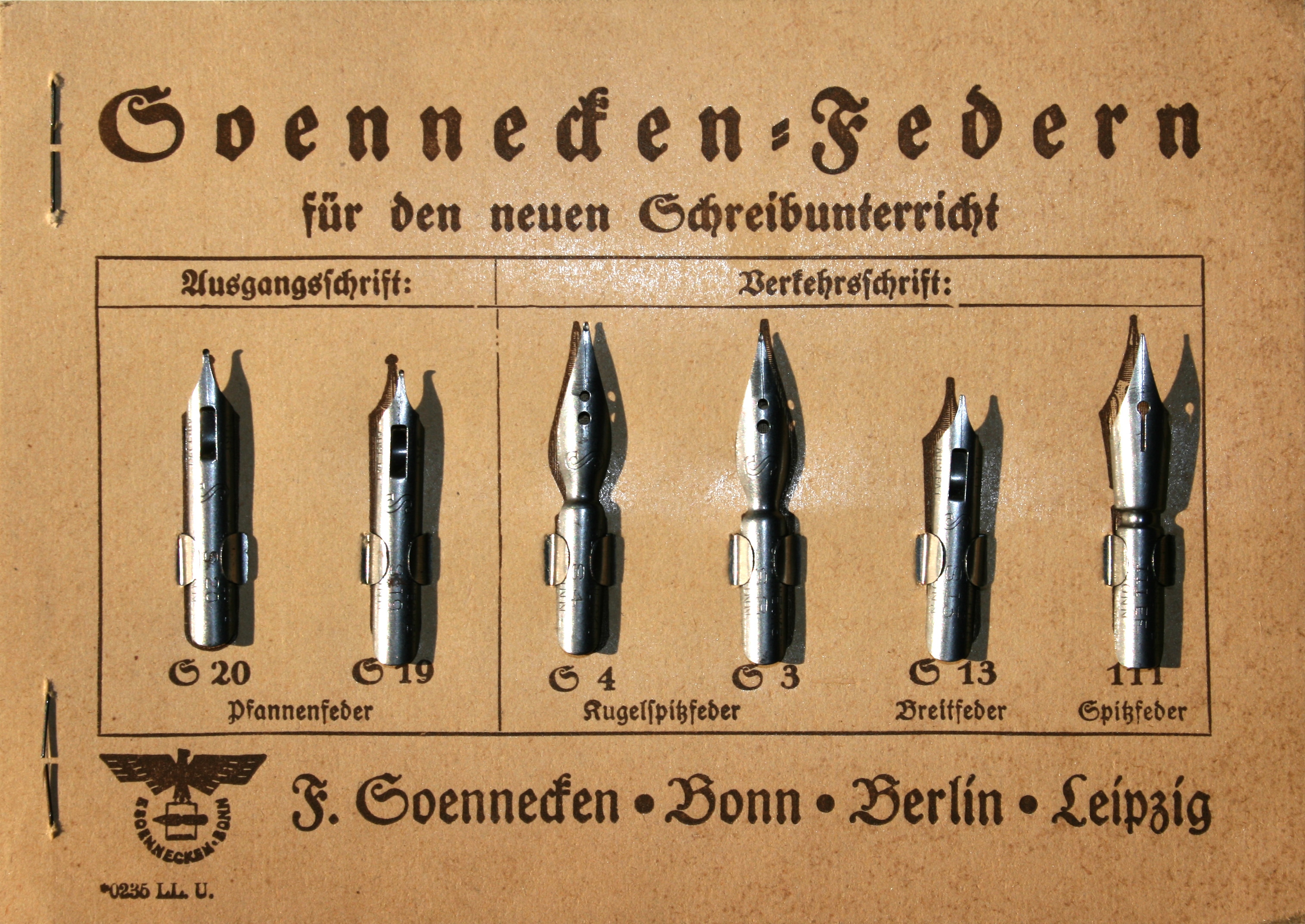 Warenprobe von Schreibfedern des Unternehmens Soennecken aus den 1930er-Jahren